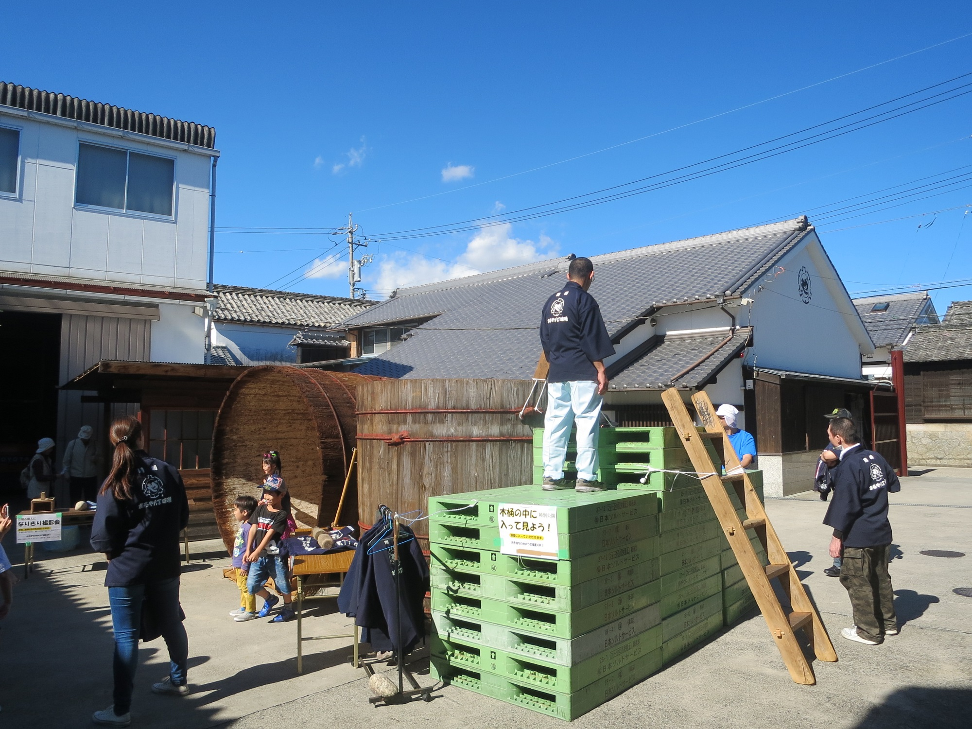 株式会社まるや八丁味噌（岡崎市八帖町）